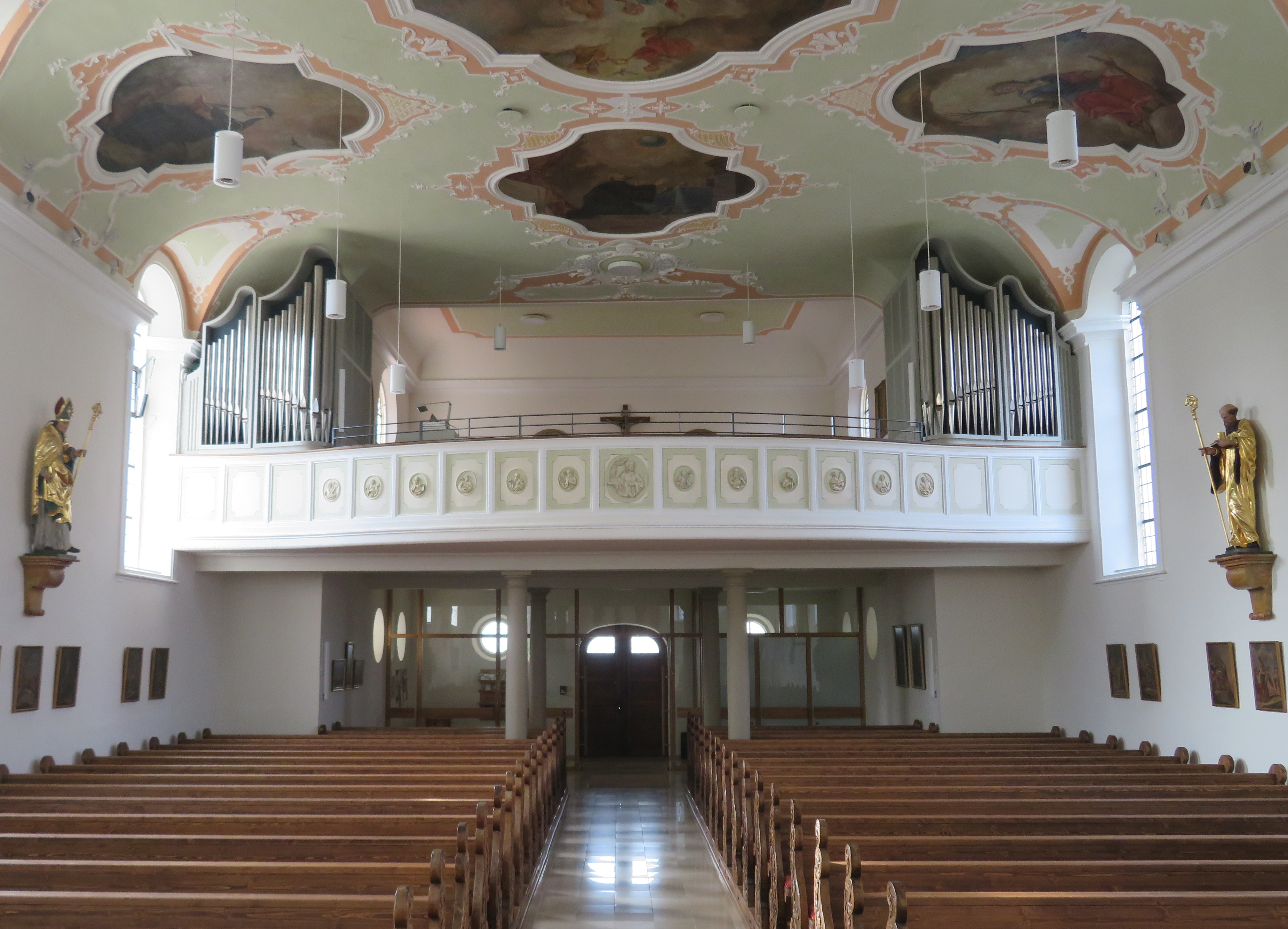 Kath. Pfarrkirche St. Martin Unterkirchberg